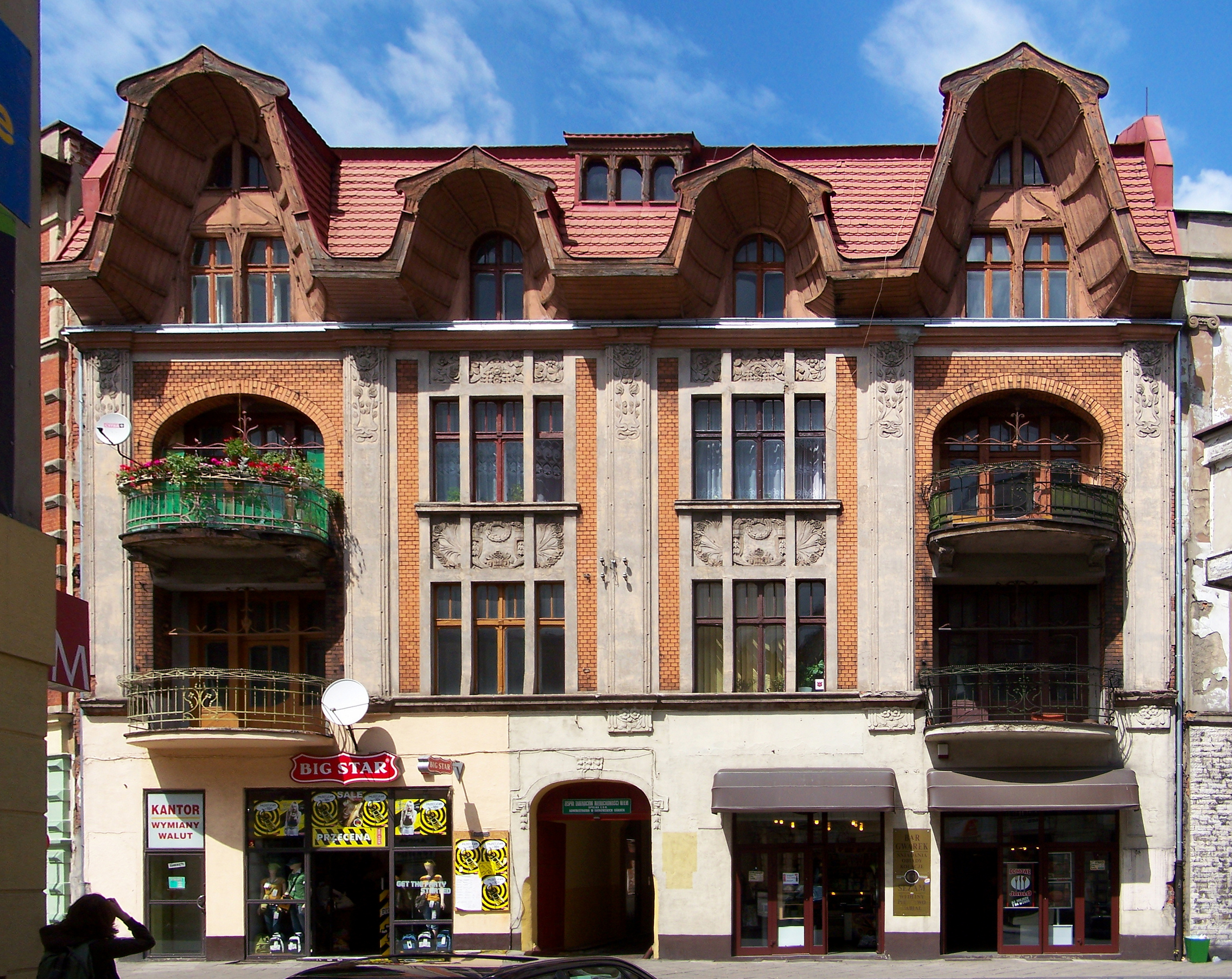 Kamienica w Tarnowskich Górach, ul. Krakowska 16